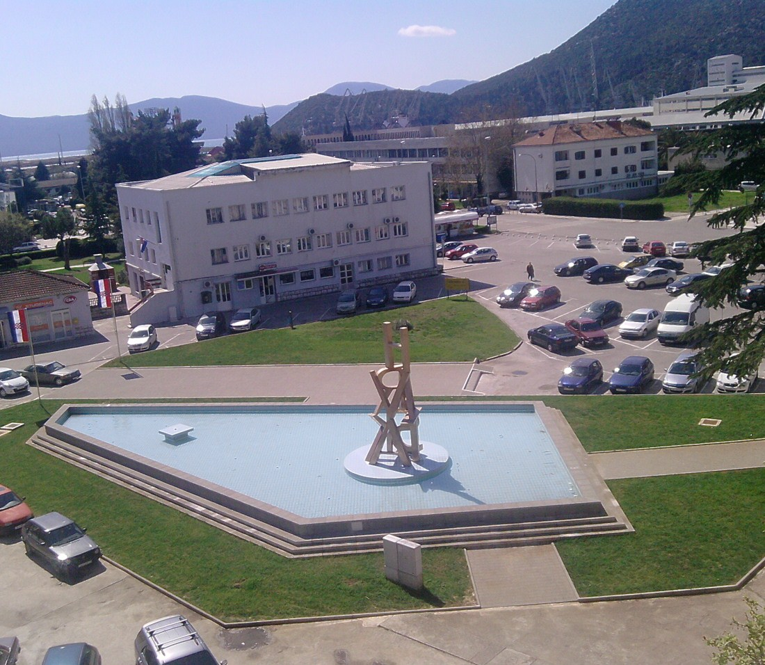 Ploče trg, opština